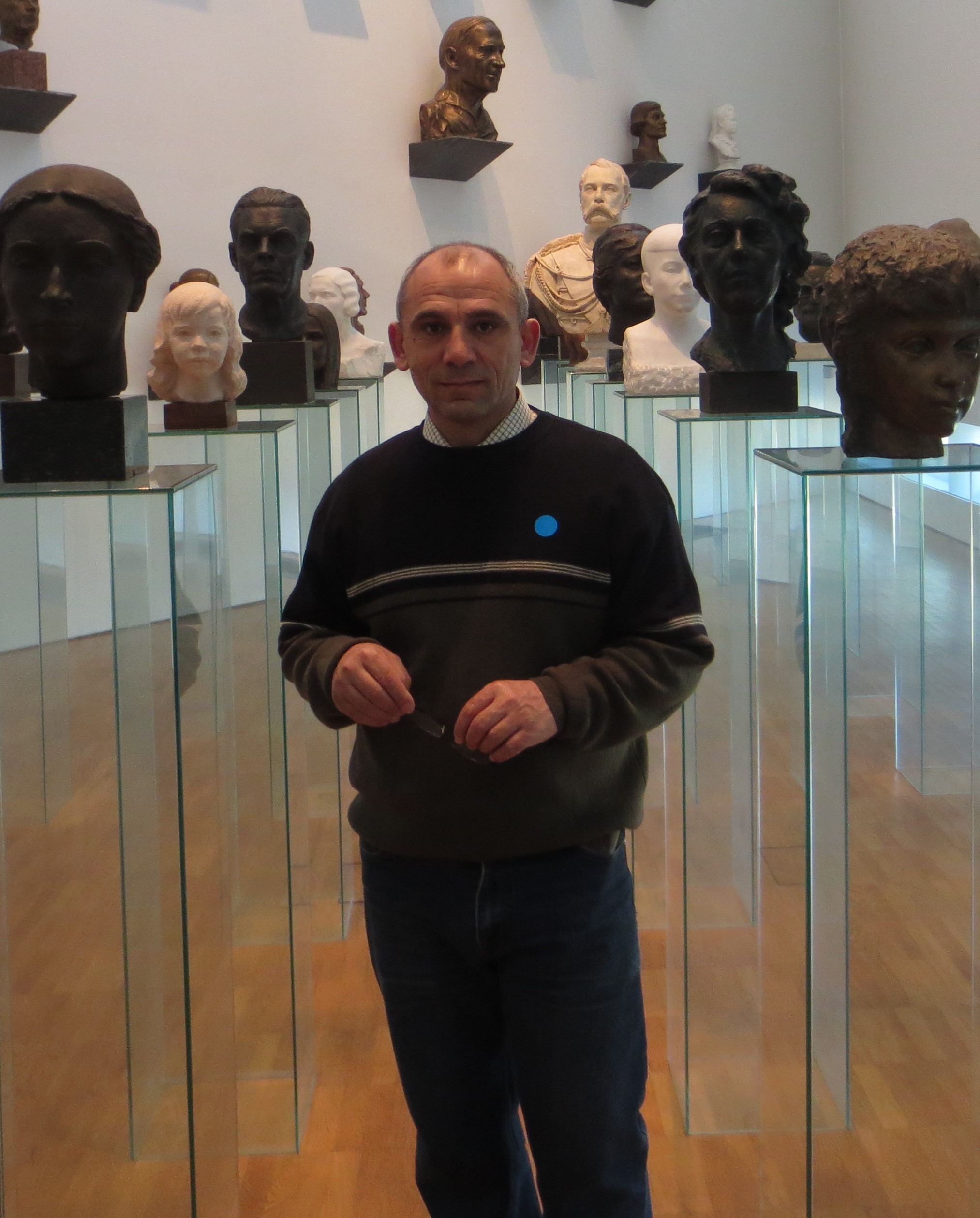 Vidadi Mamedov